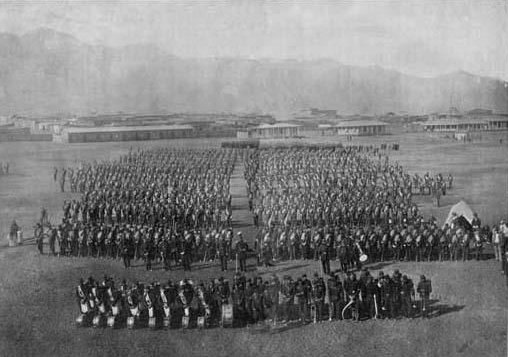 Regimiento Santiago N° 5 de Línea del Ejército de Chile, en el campamento de Antofagasta, durante la Guerra del Pacífico